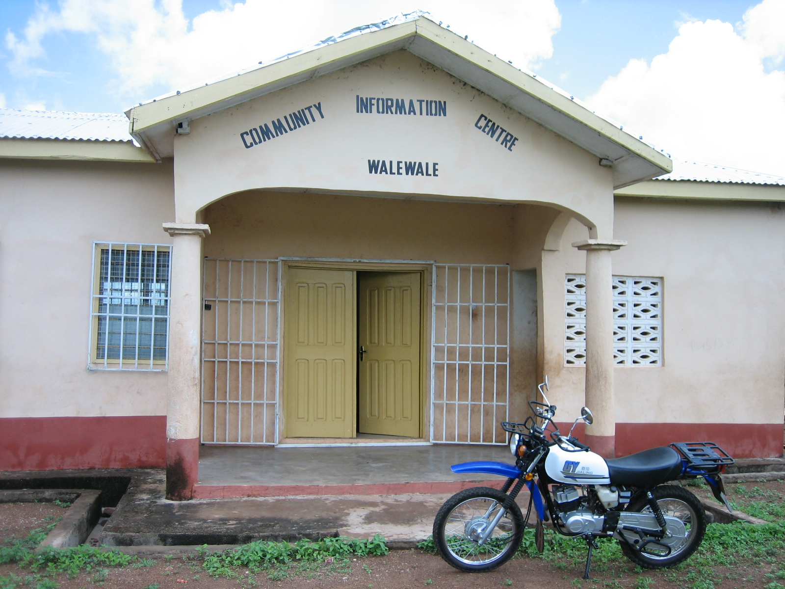 Receipt DHL 085